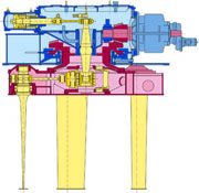 Voith Schneider Propeller